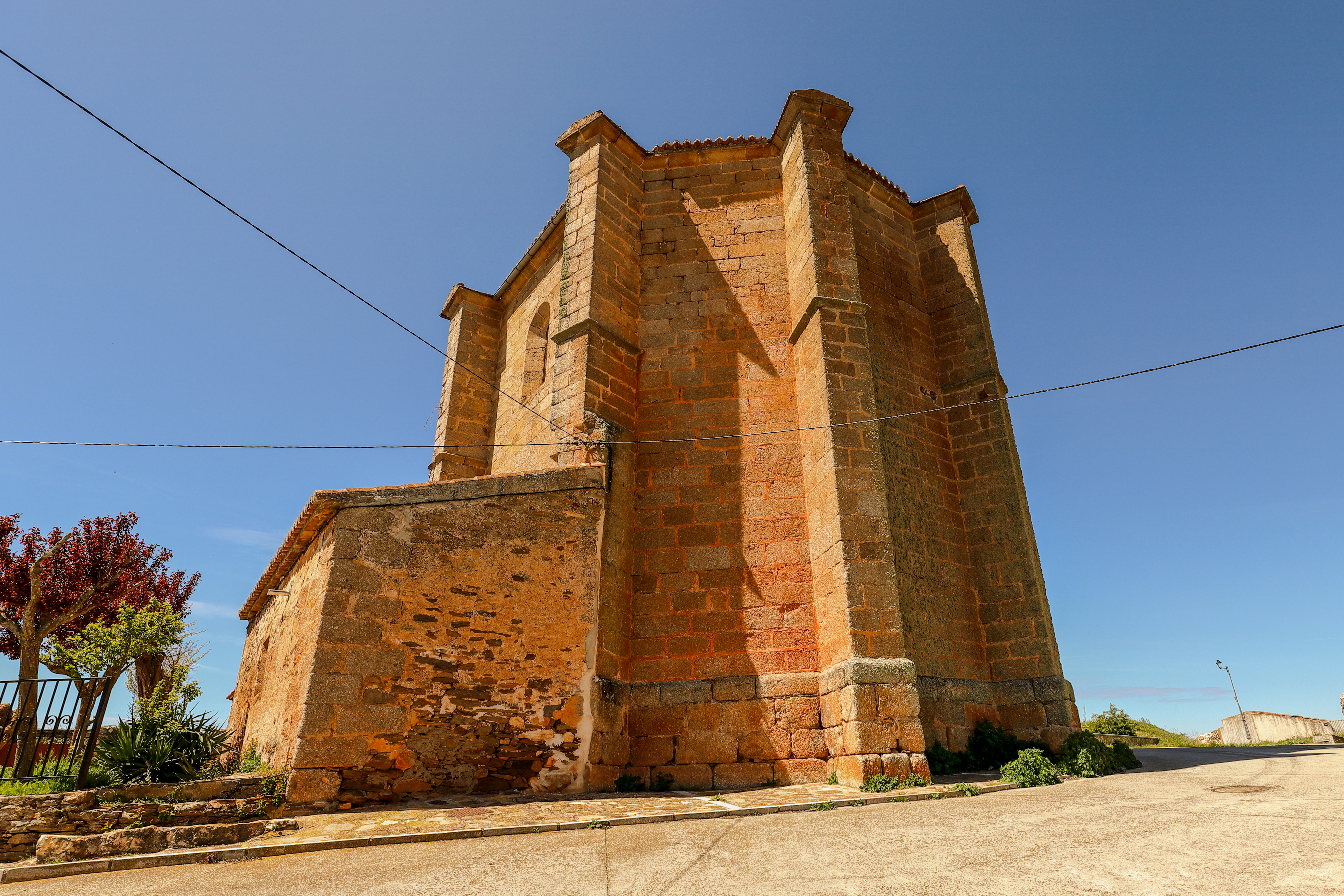 Guijo de Ávila es un municipio de la comarca Alto Tormes, provincia de Salamanca.